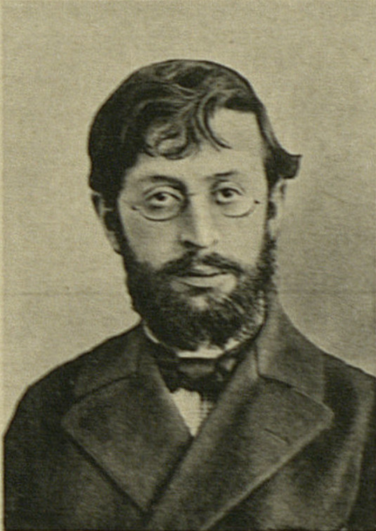 Мутник Абрам Яковлевич